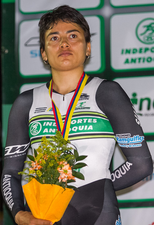 Viernes 18 de octubre de 2013 Velódromo Martín Emilio Cochise (Medellín) Campeonato Nacional de Pista 2013 Foto: ©